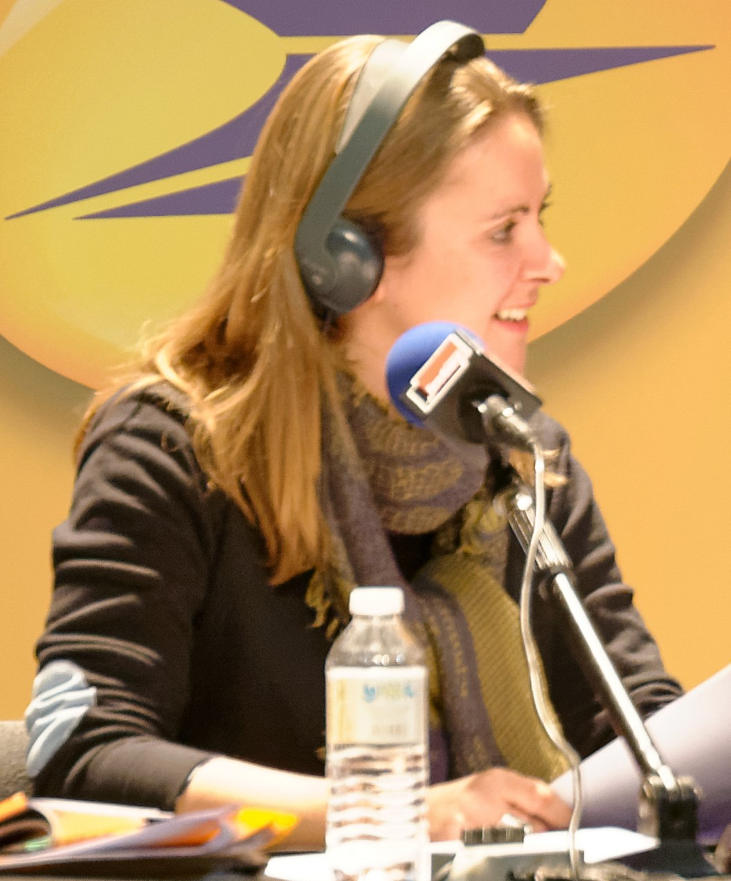 Charline Vanhoenacker lors de l'enregistrement public de l'émission "Si tu écoutes j'annule tout" lors du "Tour de France Inter" à Dijon, le vendredi 22 janvier 2016 au Grand Théâtre de Dijon (Côte d'Or, Bourgogne-Franche Comté, France).